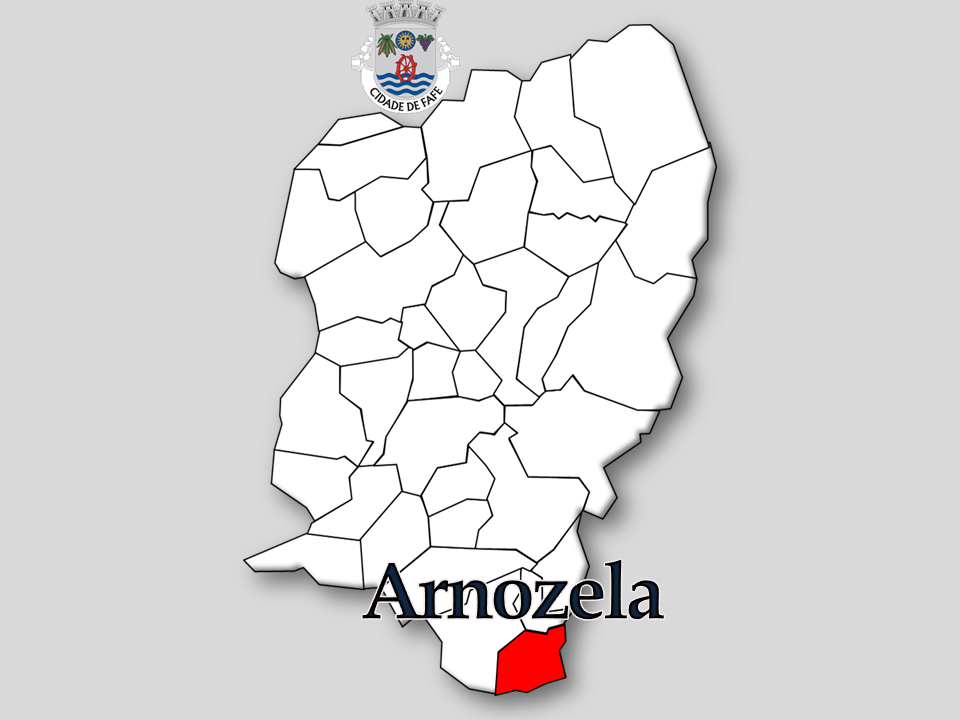 Censos 1864/2011